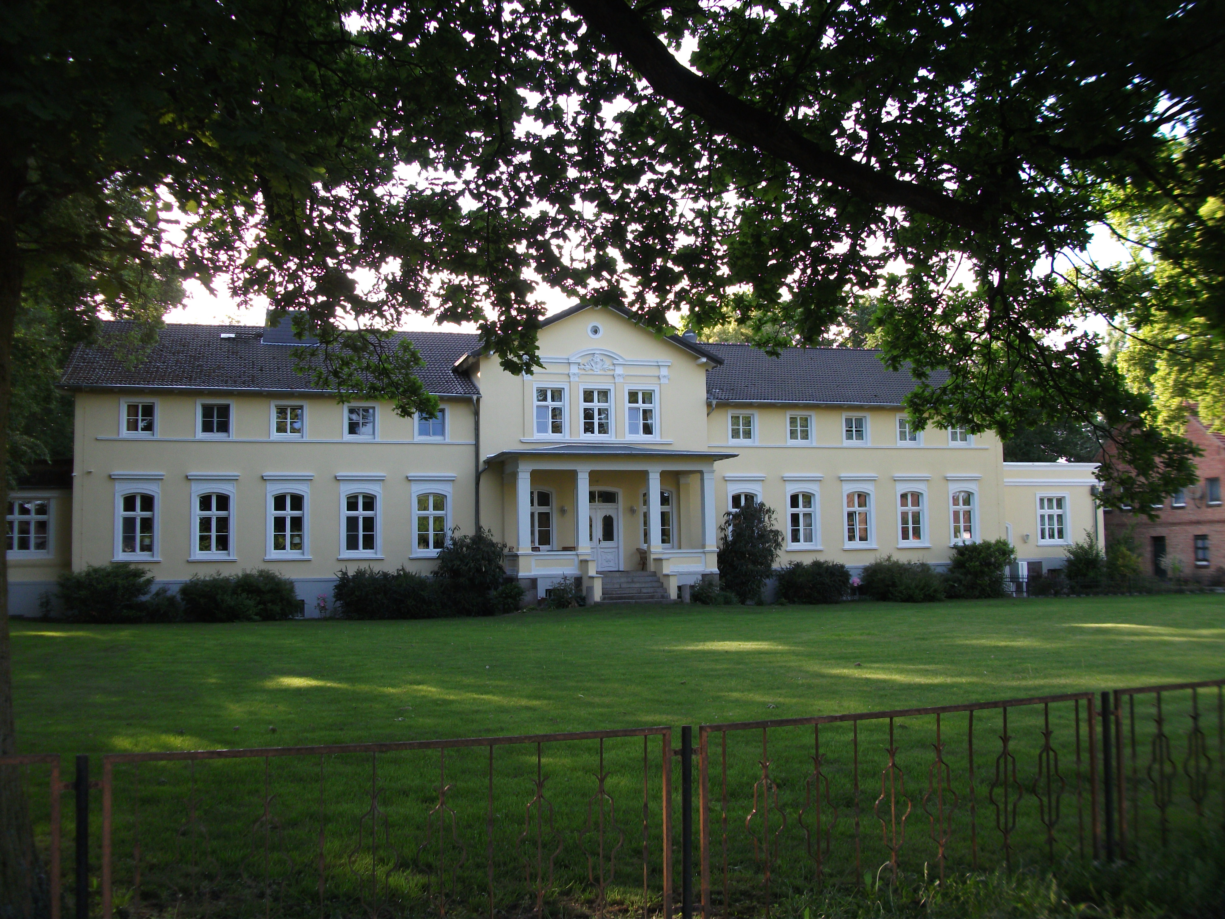 Dawny dwór w Krackow,obecnie Muzeum Motoryzacji.